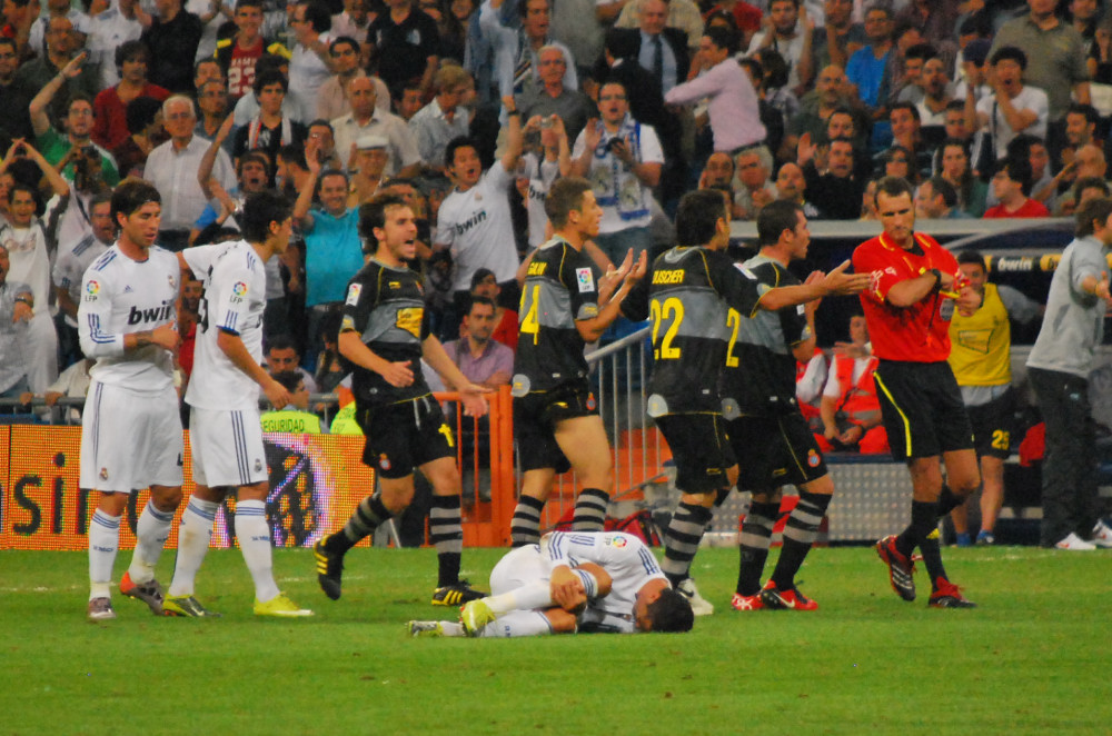 El árbitro Clos Gómez se dispone a sacar tarjeta como sanción a una acción contra Cristiano Ronaldo. Jornada 4 de la Liga de Primera División 2010.